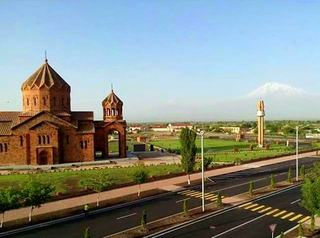 Սուրբ Հովհաննես եկեղեցի